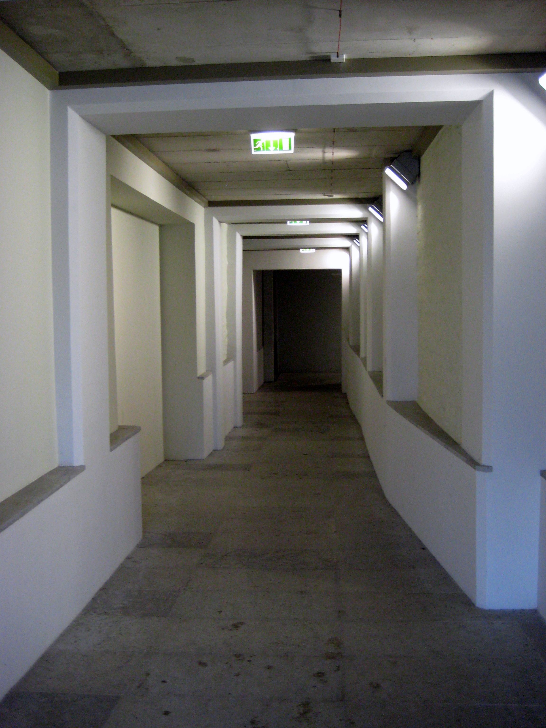 Tartu raudteejaama tunnel